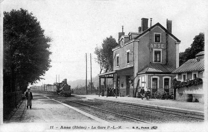 La gare d'Ans vers 1900 avec le bâtiment d'Alexis Cendrier (toujours présent en 2013).